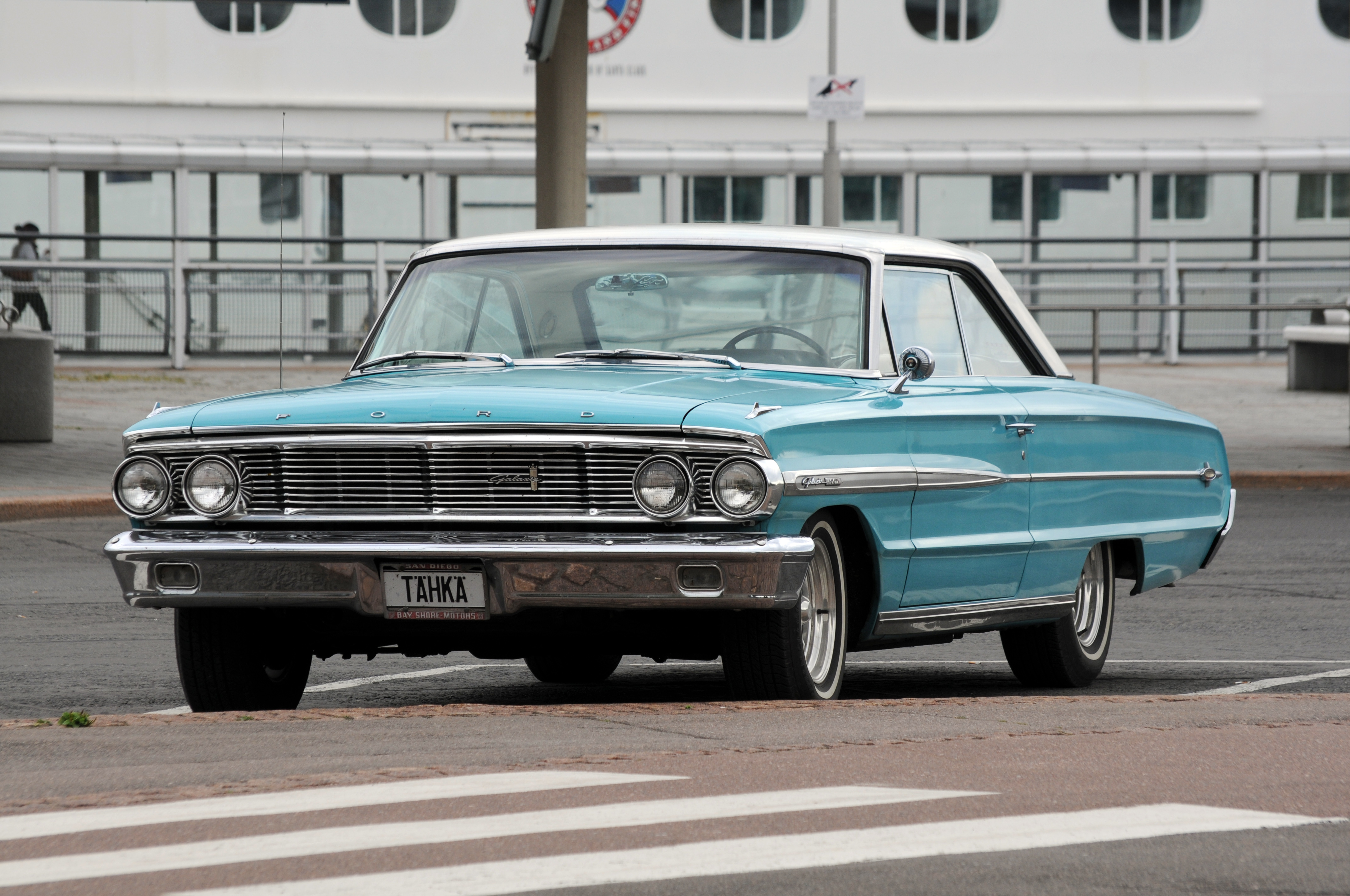 Bilderserie als Lehrstoff, wie ein PKW zu fotografieren ist und wie man ein Kennzeichen manipuliert This file is used in a Wikiversity project or course. Please don't change it before you inform the author. optimal ist starker Zoom, hier 300 mm